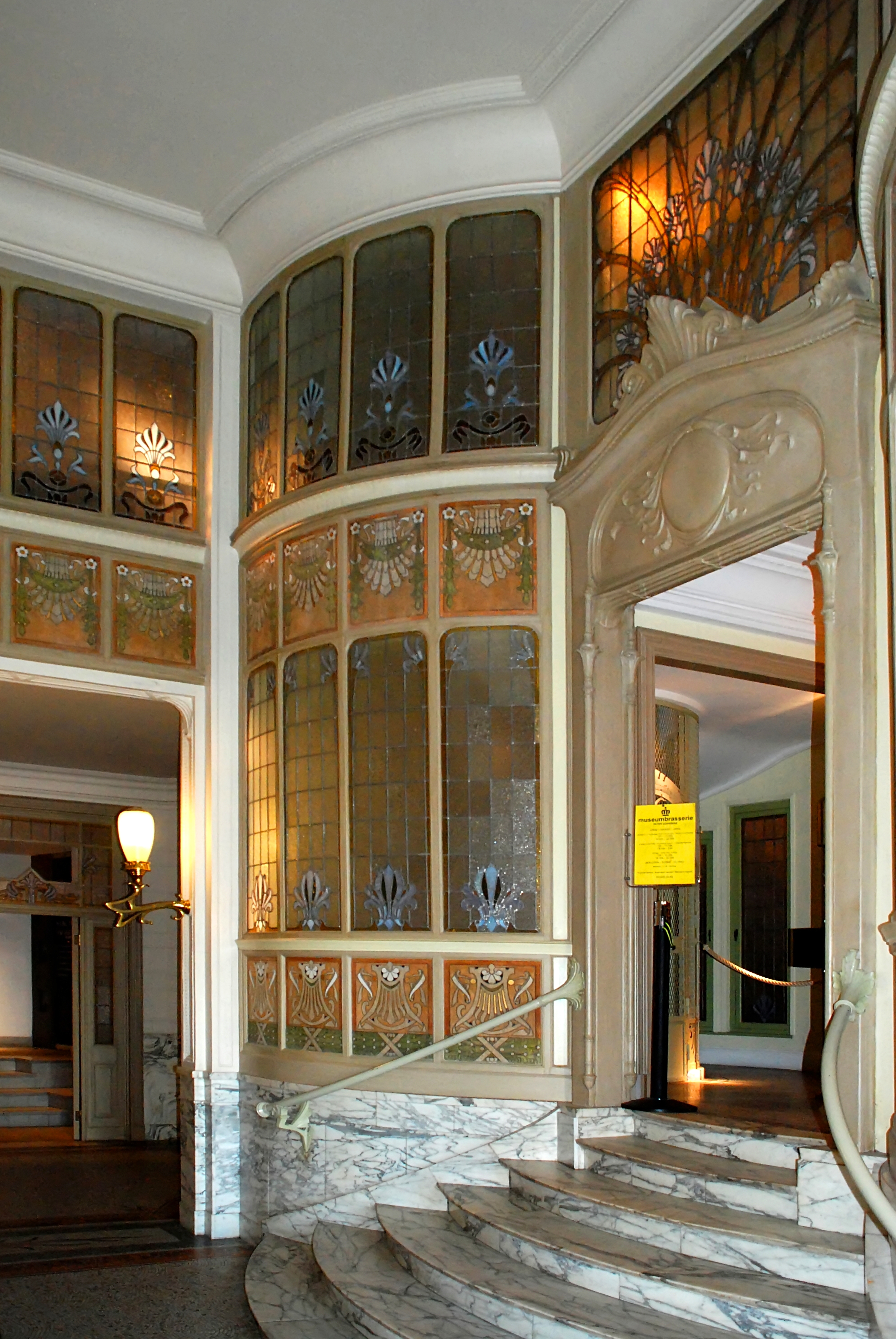 Léon Govaerts - Siège de la Gresham Life Assurance Society Limited, Place Royale à Bruxelles (Art nouveau; 1903)